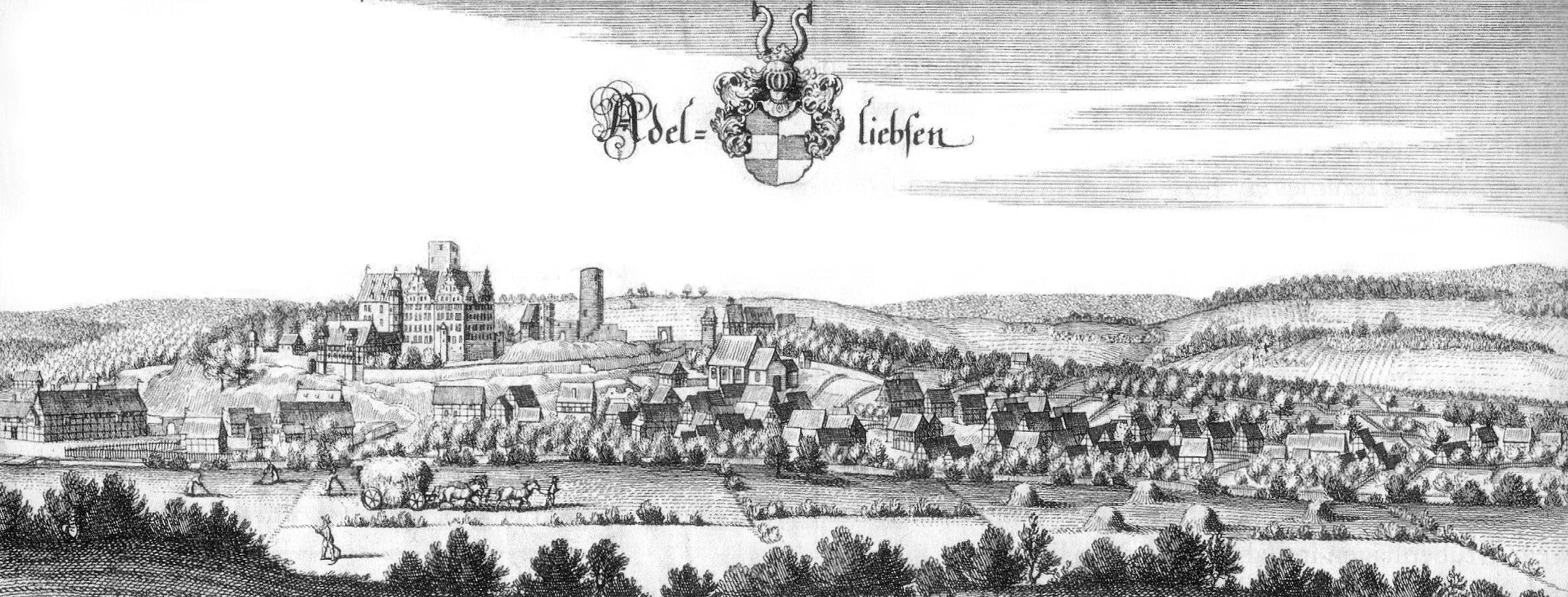 Adeliebsen. Wenn das hier angegebene Erscheinungsjahr 1654 stimmt, dann könnte der Autor Matthäus Merian der Jüngere sein. Zur genaueren Bestimmung braucht es einen Nachweis der Quelle.